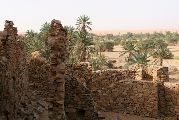 Ouadane, Mauritania